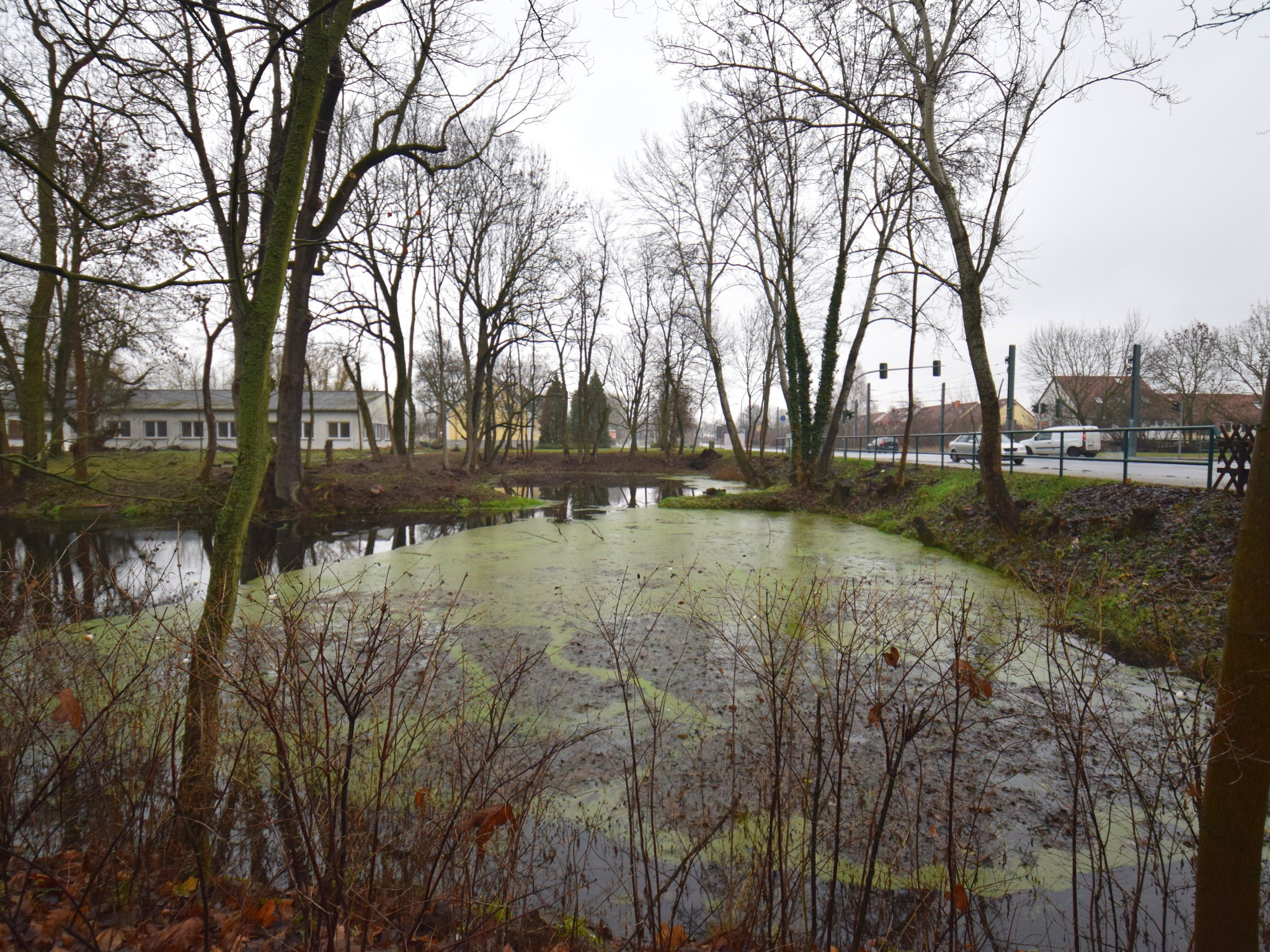 Dorfteich Frankfurt (Oder)-Markendorf